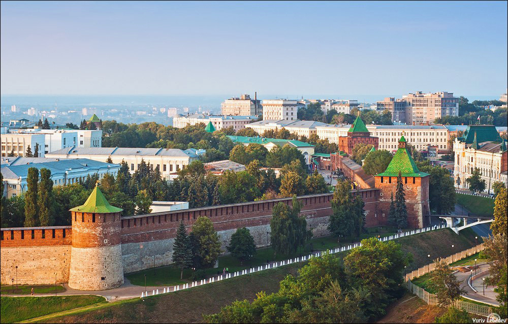 Нижегородский Кремль с высоты